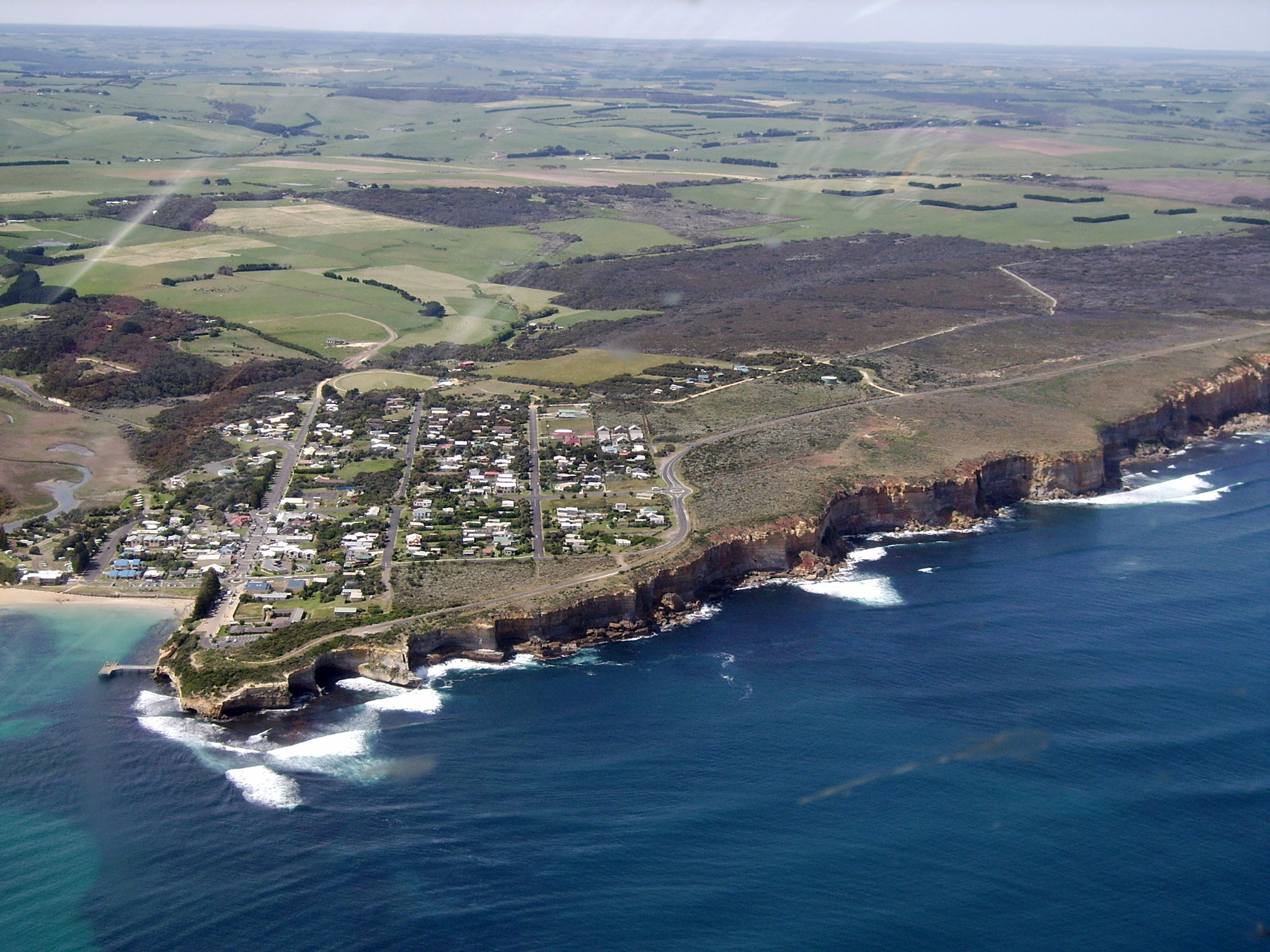 Port Campbell, Victoria, Australie